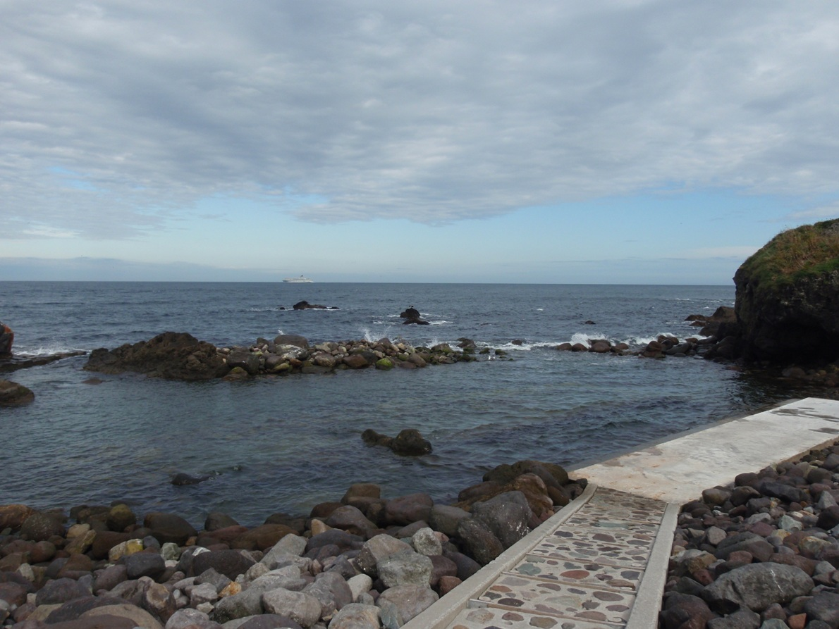 水無海浜温泉、満潮の為水没